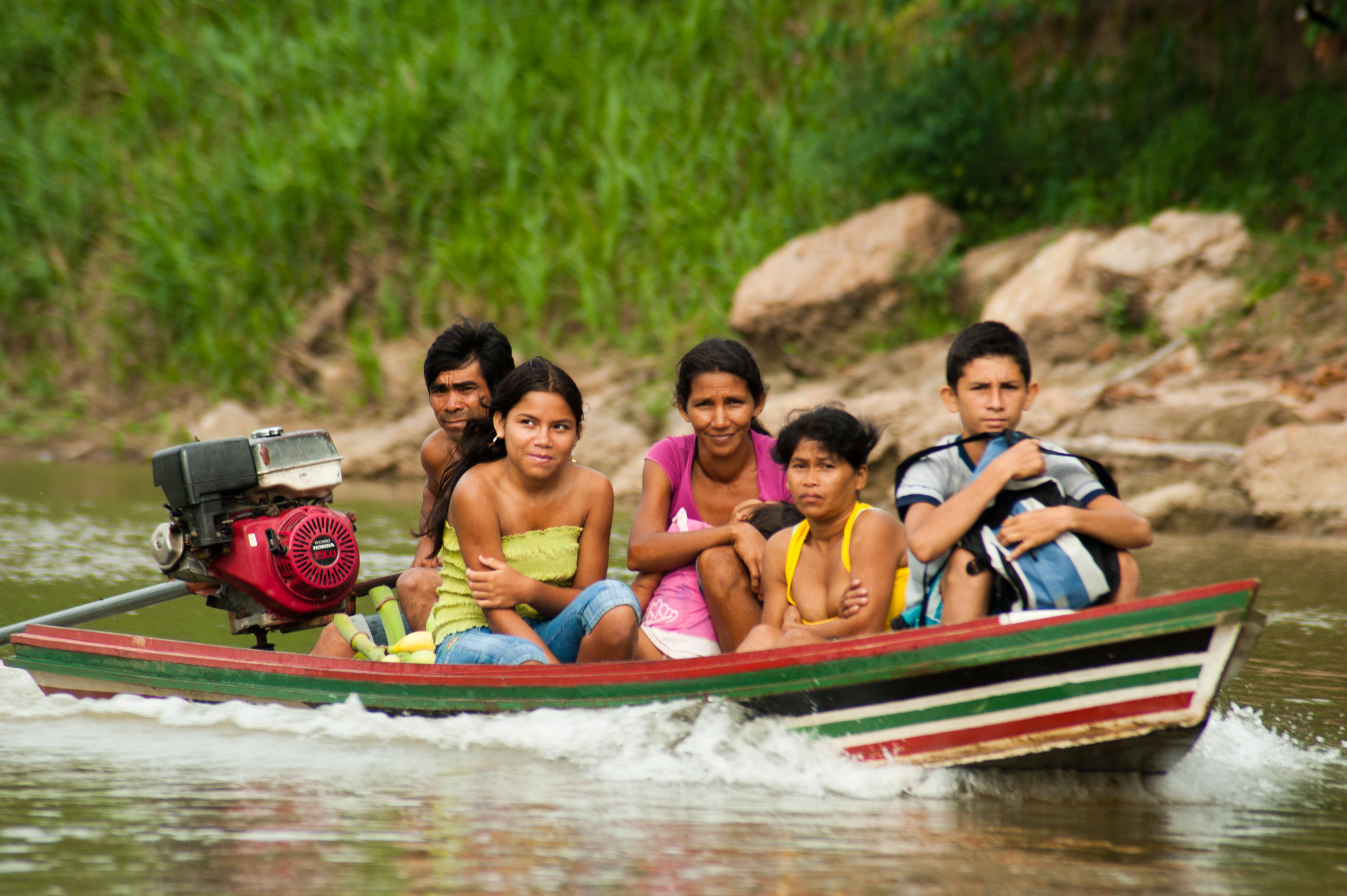 Margens do Rio Amônea, seguindo para aldeia Apiwtxa, Terra Indígena Ashaninka © Pedro França/MinC